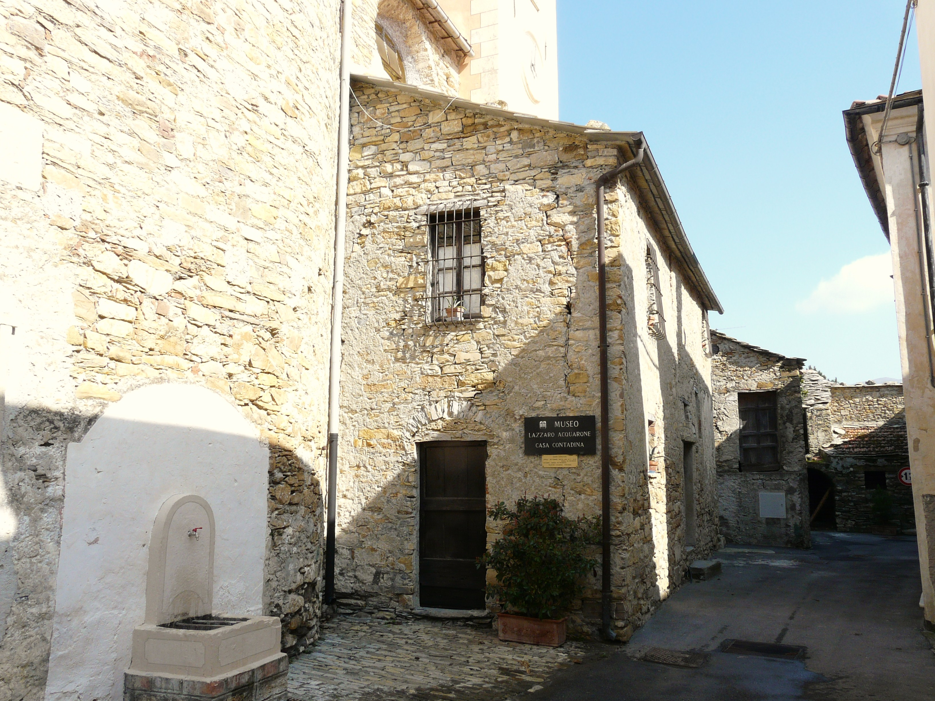 Museo Lazzaro Acquarone, Liguria, Italia